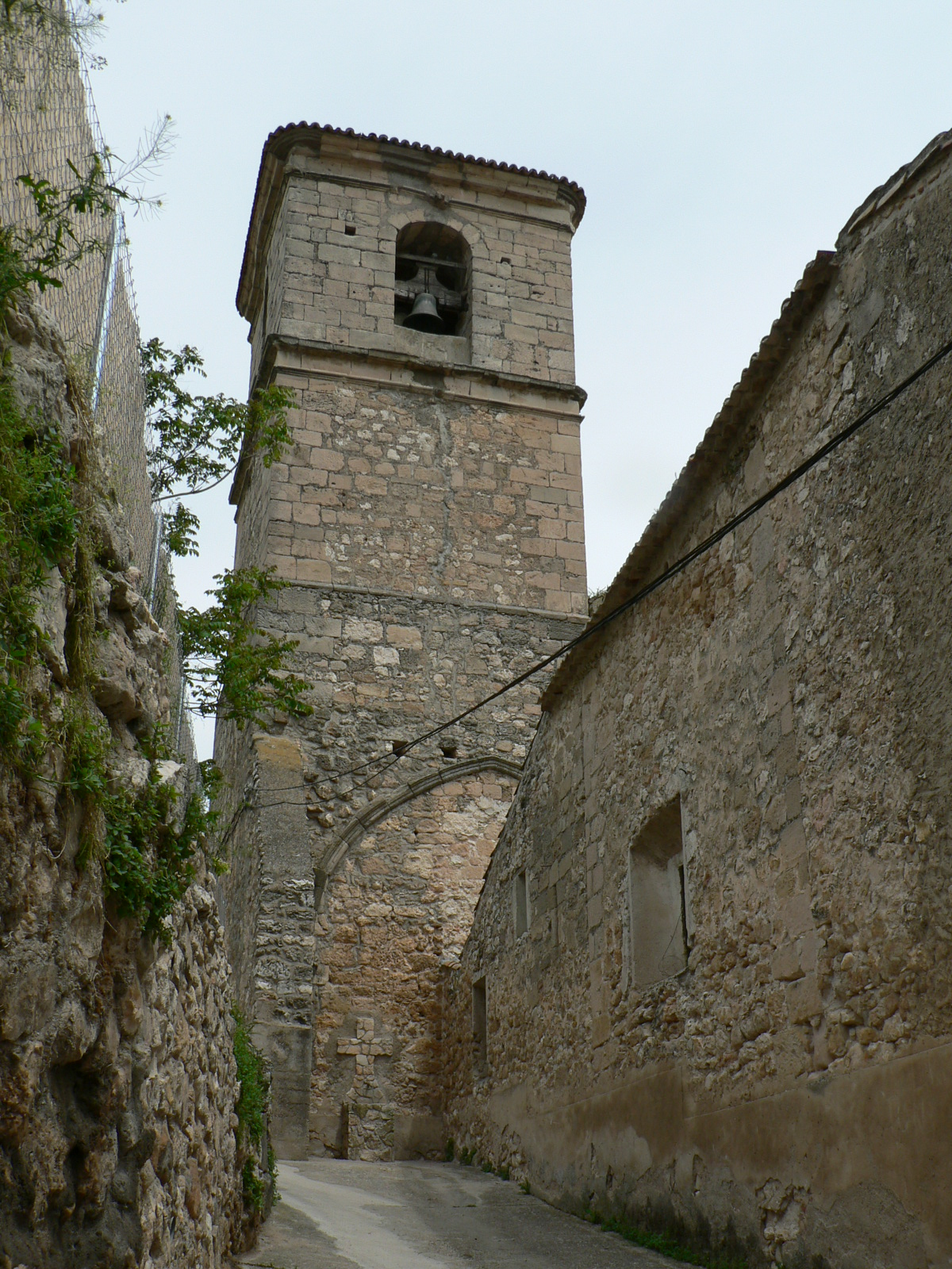 Budia-La torre de la iglesia de San Pedro Apóstol.